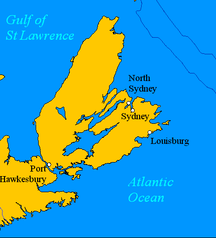 carte plus précise du Cap-Breton